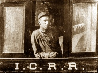 Das einzige Bild das Casey auf seiner MAschine zeigt.